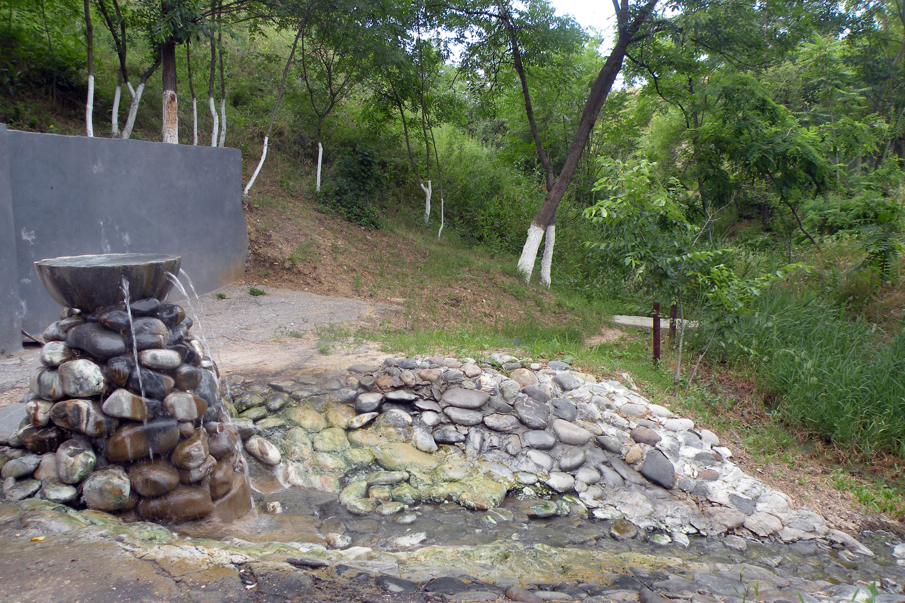 Горячий источник около санатория Серноводск-Кавказский в Чечне, июнь 2016